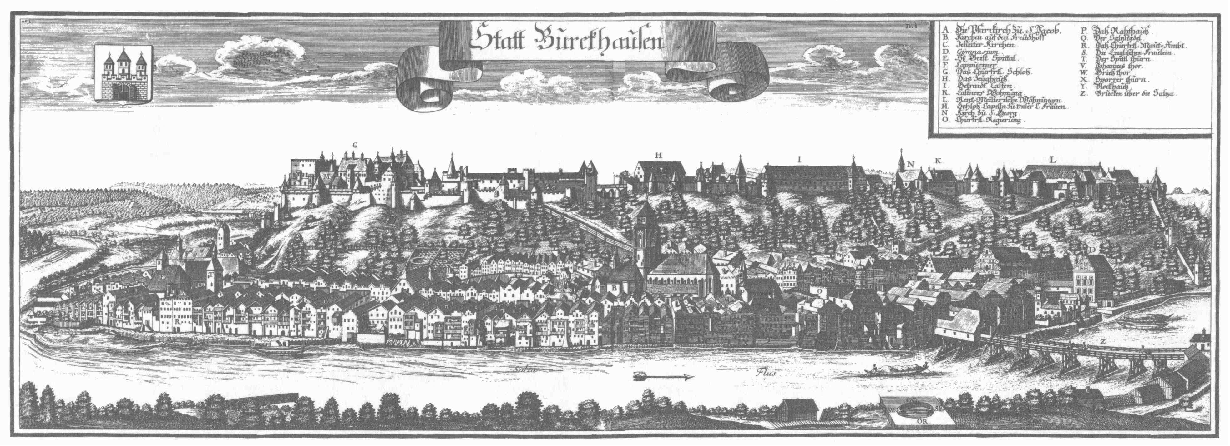 Panorama von Burghausen nach einem einem Kupferstich von Michael Wening von 1699